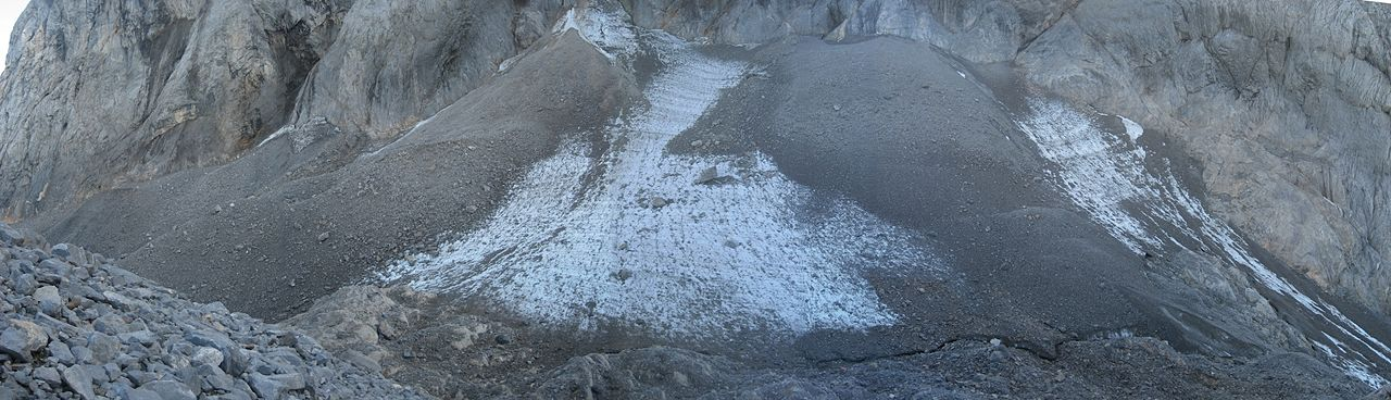 Eiskar, ein Kargletscher der Karnischen Alpen